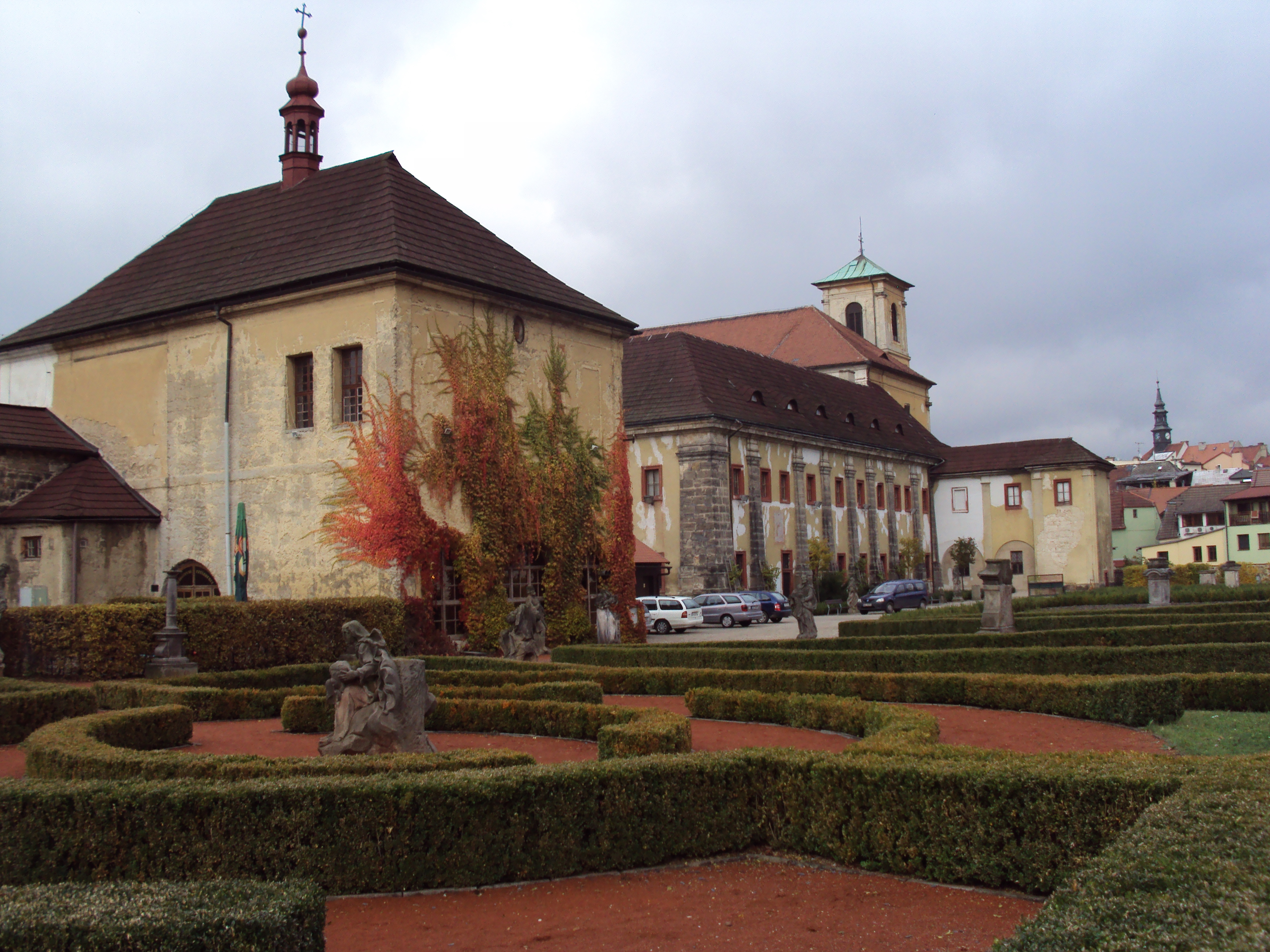 Zahrada v zadním traktu komplexu Augustiniánského kláštera v České Lípa navazuje na Vlastivědné muzeum